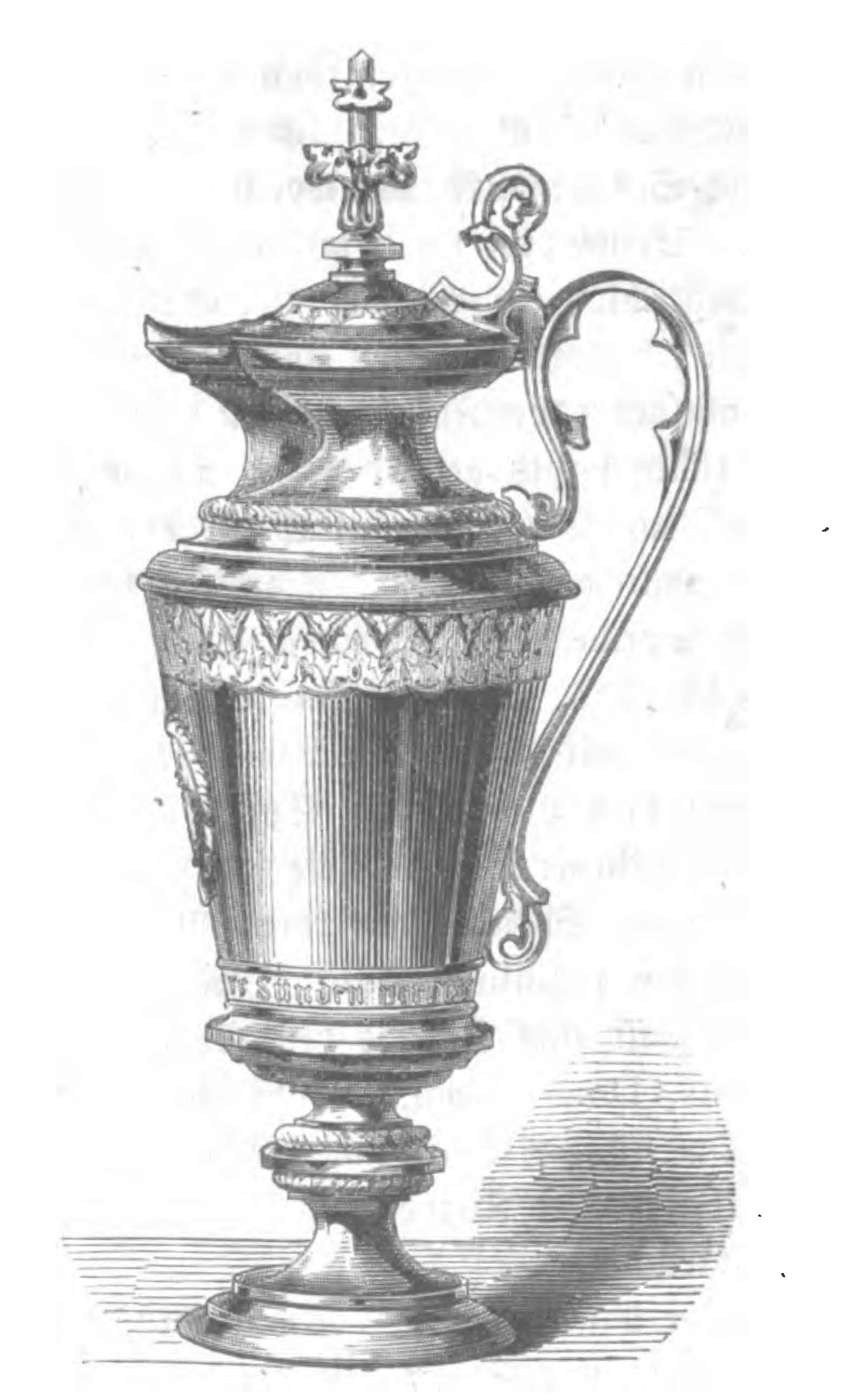 Carl Beisbarth: Entwurfszeichnung für eine Abendmahlskanne, Holzschnitt, 1863.